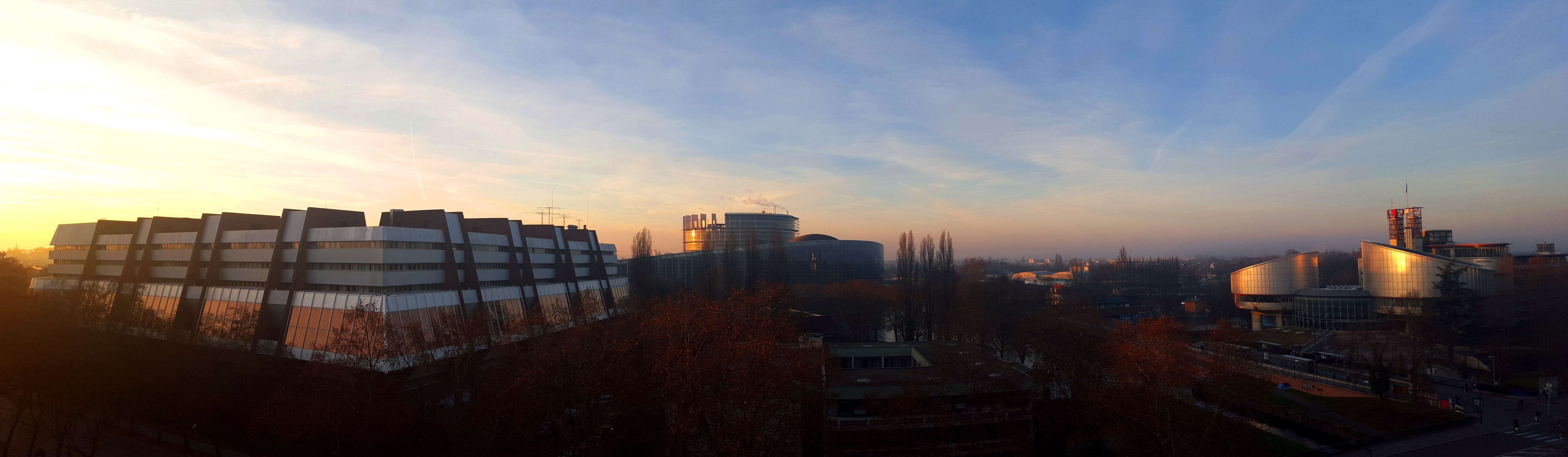 Institutions européennes à Strasbourg